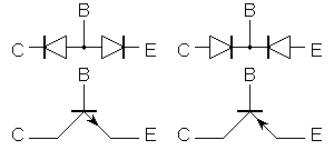 Bipoláris tranzisztor rajzjele. Baloldalt az NPN, jobboldalt a PNP típusú tranzisztor, felettük a helyettesítő kapcsolás